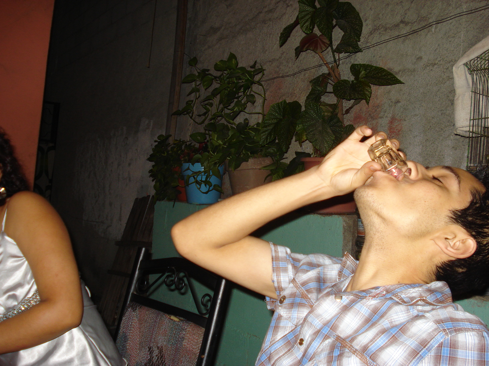 Jugando caricachupas